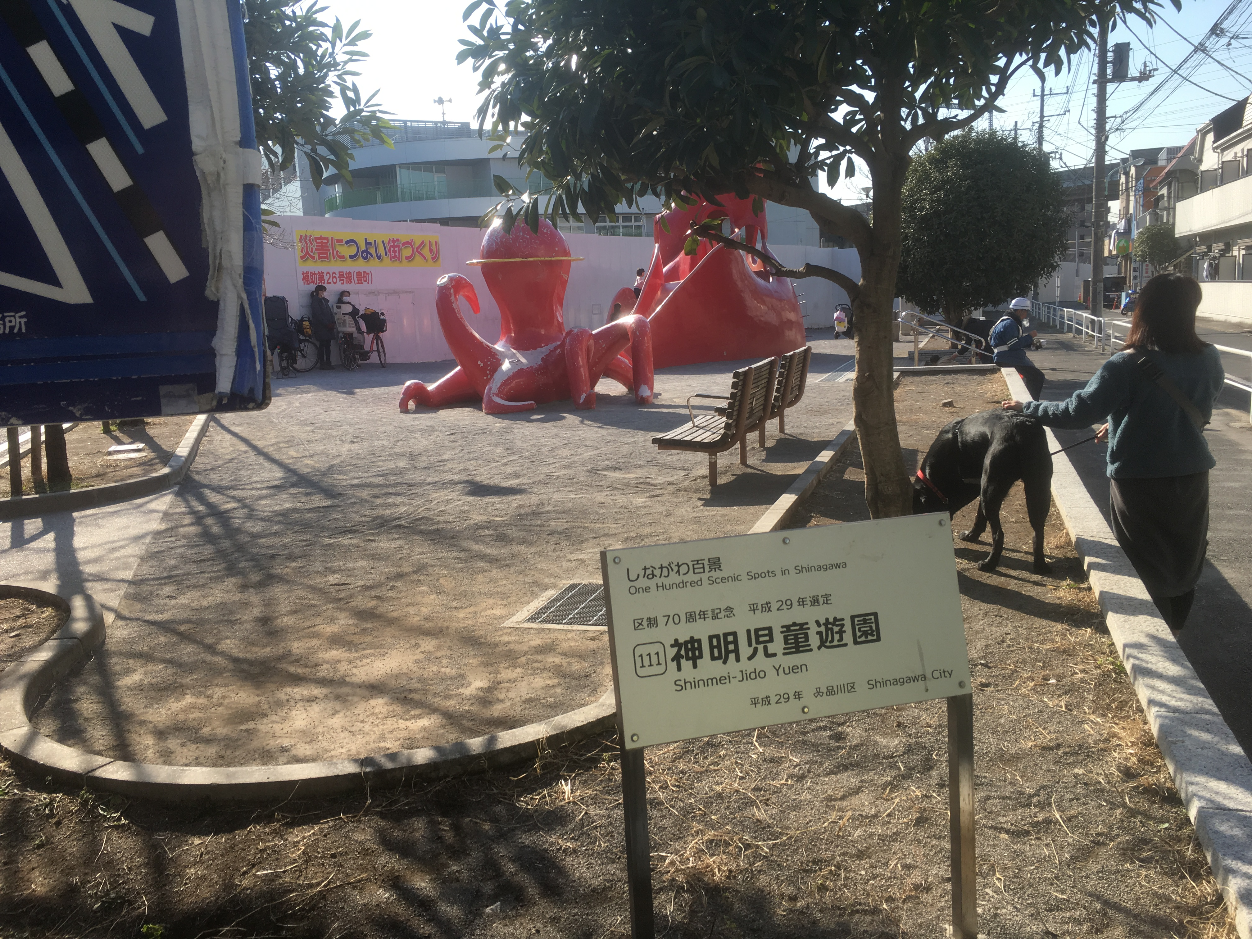 神明児童遊園 (shinmei-jido yuen)